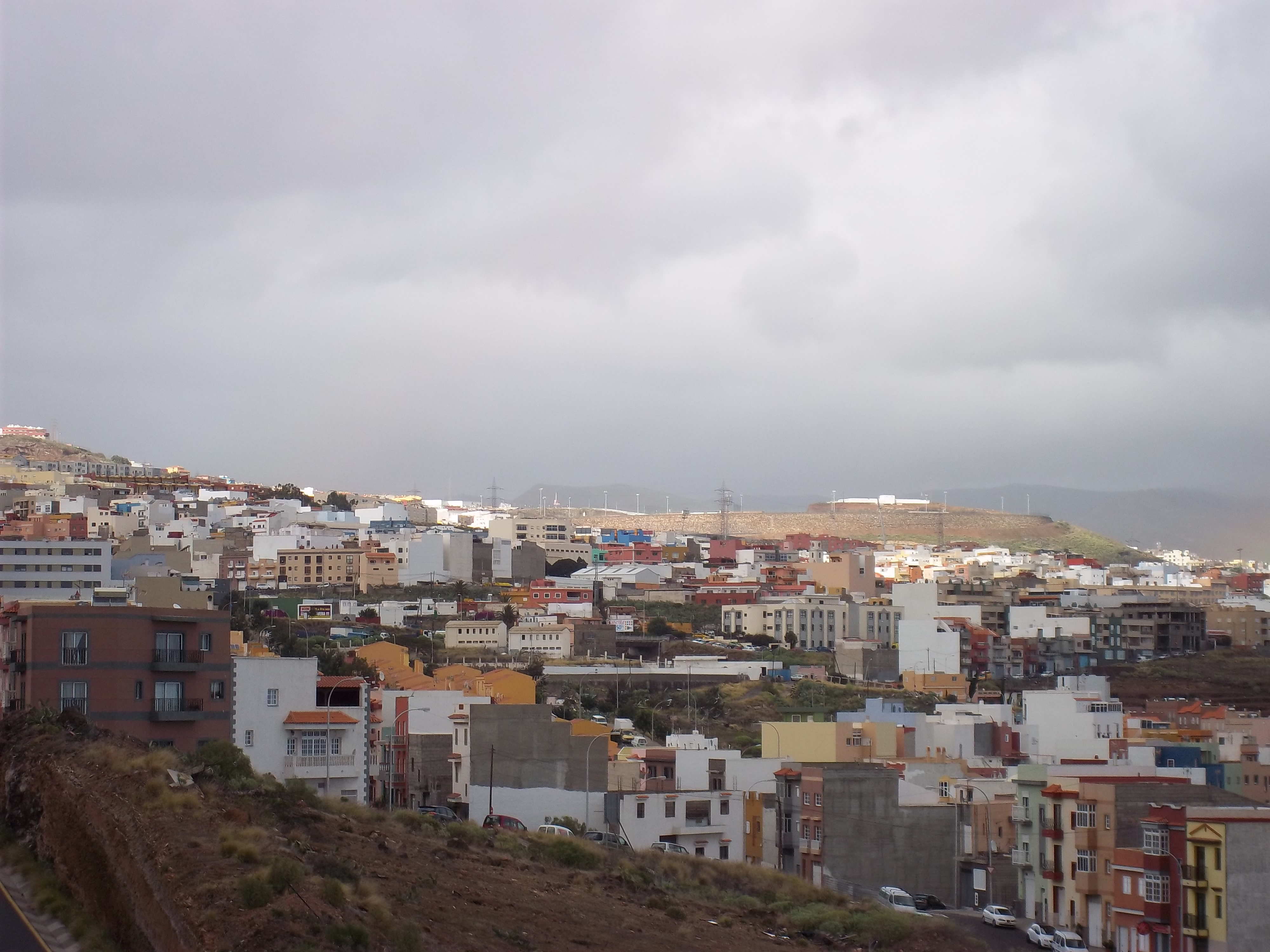 Vista de Los Alisios y alrededores desde Cuevas Blancas (Santa Cruz de Tenerife)